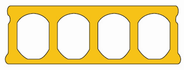 Die charakteristischen Hohlräume im Innern der Deckenelemente sorgen nicht nur für ein geringes Gewicht. Der ressourcenschonende Materialeinsatz führt auch zu positiven Werten in der Ökobilanz von Spannbeton-Fertigecken.